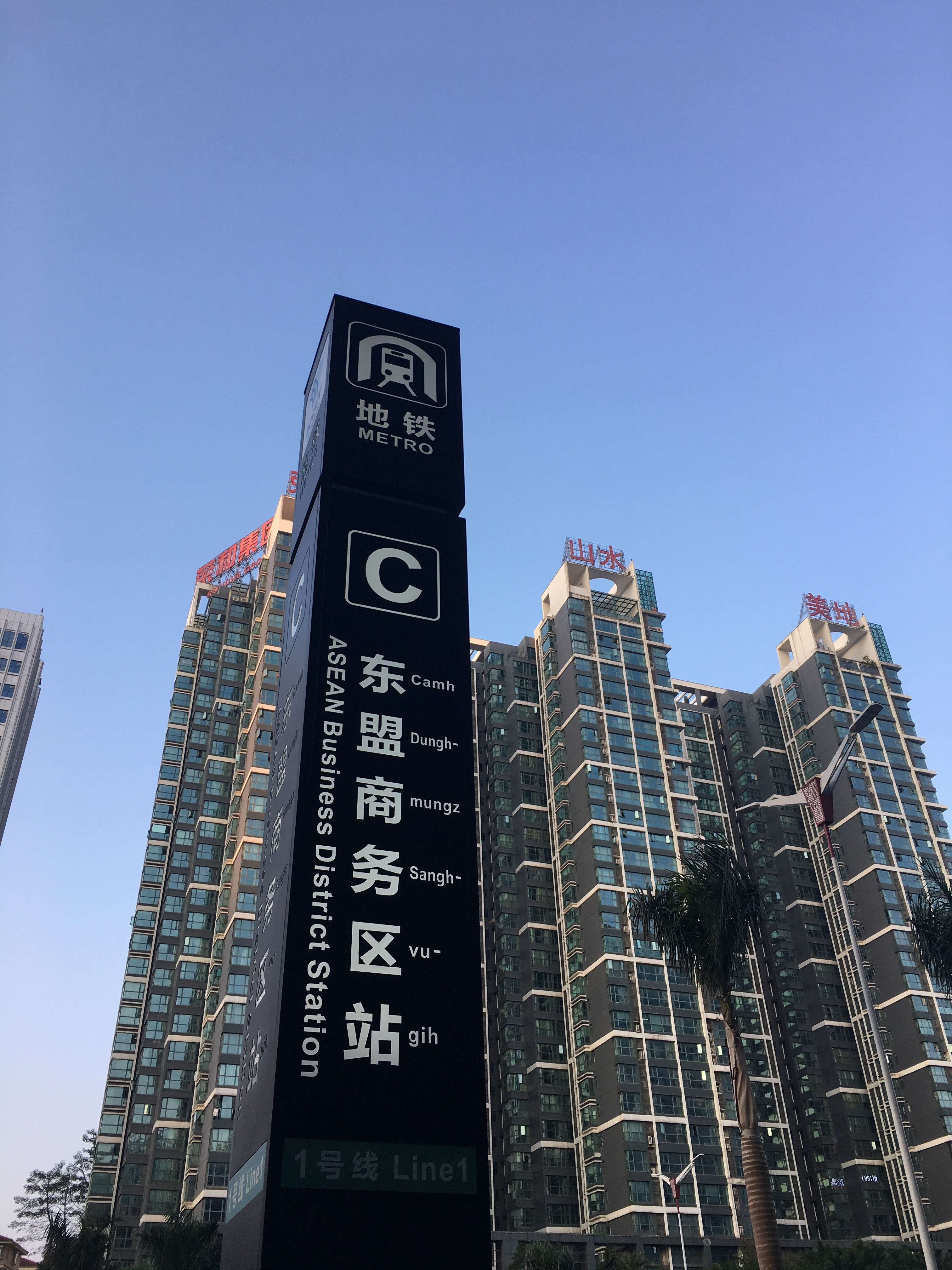 中文（中国大陆）: 南宁轨道交通东盟商务区站C出口